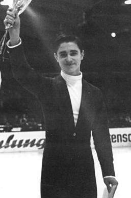 Jahn Hoffmann, Günter Zöller, Wladimir Kowalew Zentralbild Thieme 15.11.69 Karl-Marx-Stadt: Internationales Eiskunstlaufen um den Pokal der blauen Schwerter. Siegerehrung der Herren. vlnr: Jahn Hoffmann (DDR, 3. Pl.), Günter Zöller (DDR, 1. Pl.) und Wladimir Kowalew (UdSSR, 2. Pl.).